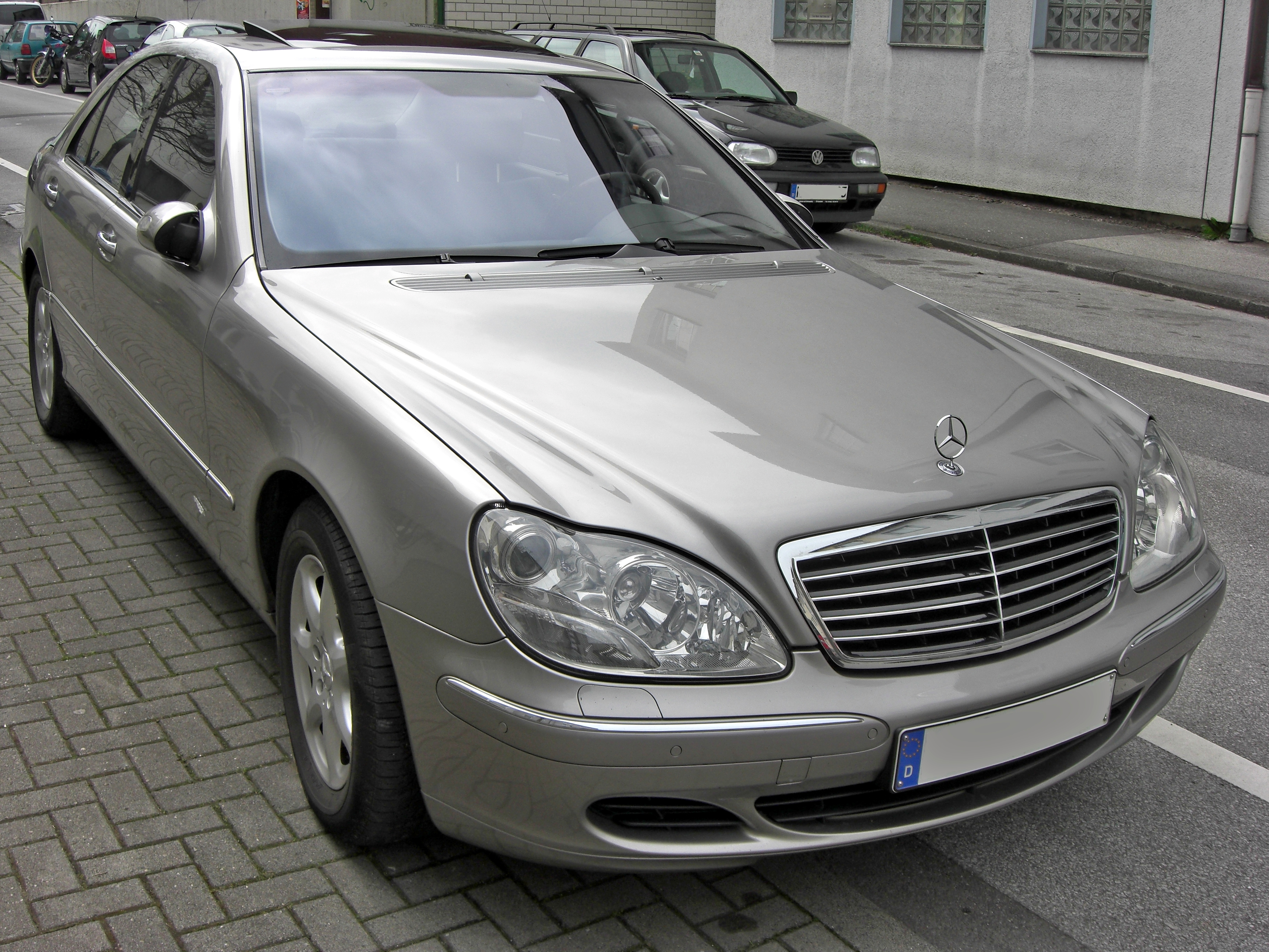 Mercedes S-Klasse